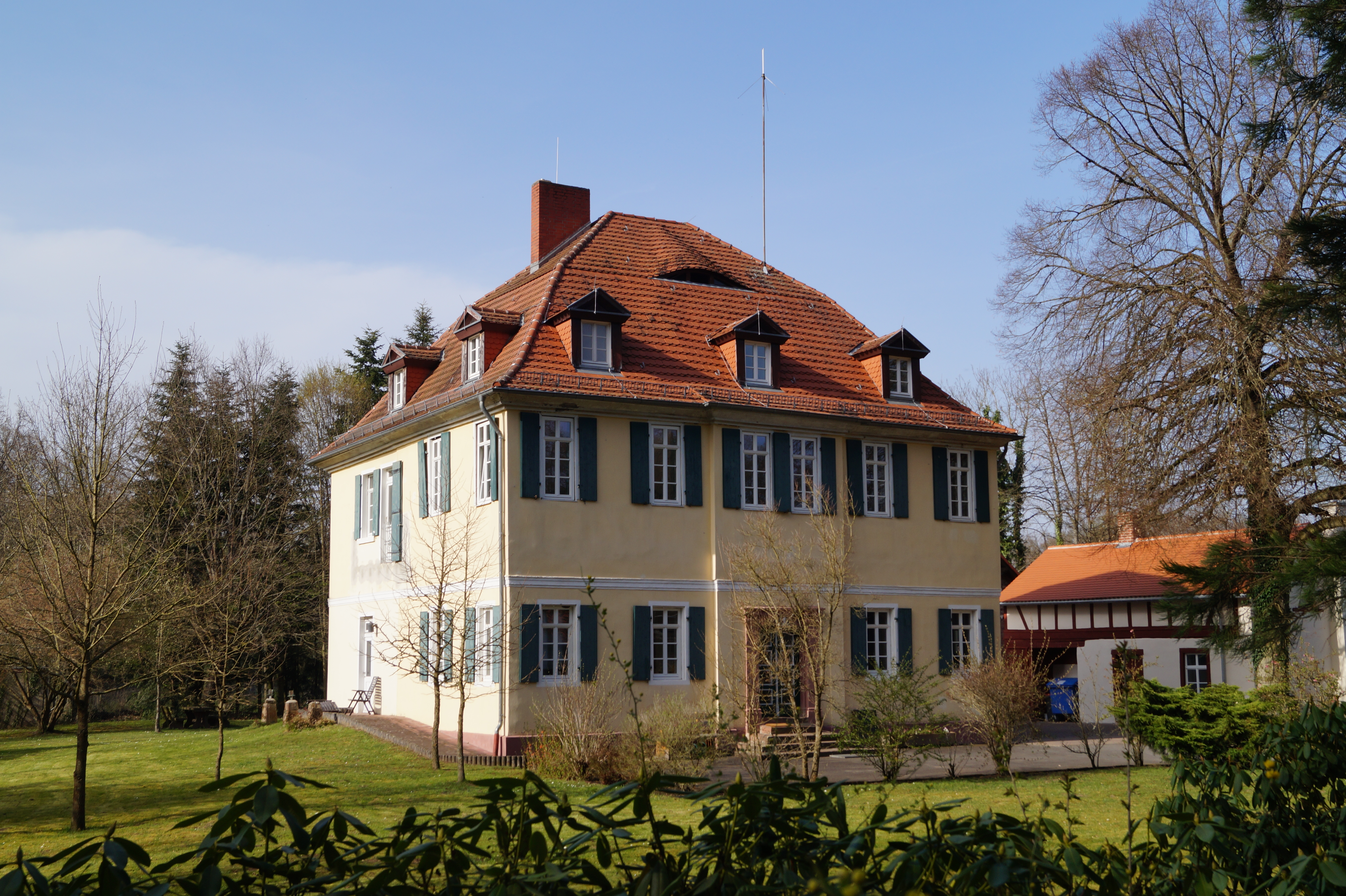 Hanau-Wolfgang, Jagdschloss des letzten Hanauer Grafen Johann Reinhard III., heute Forstamt.